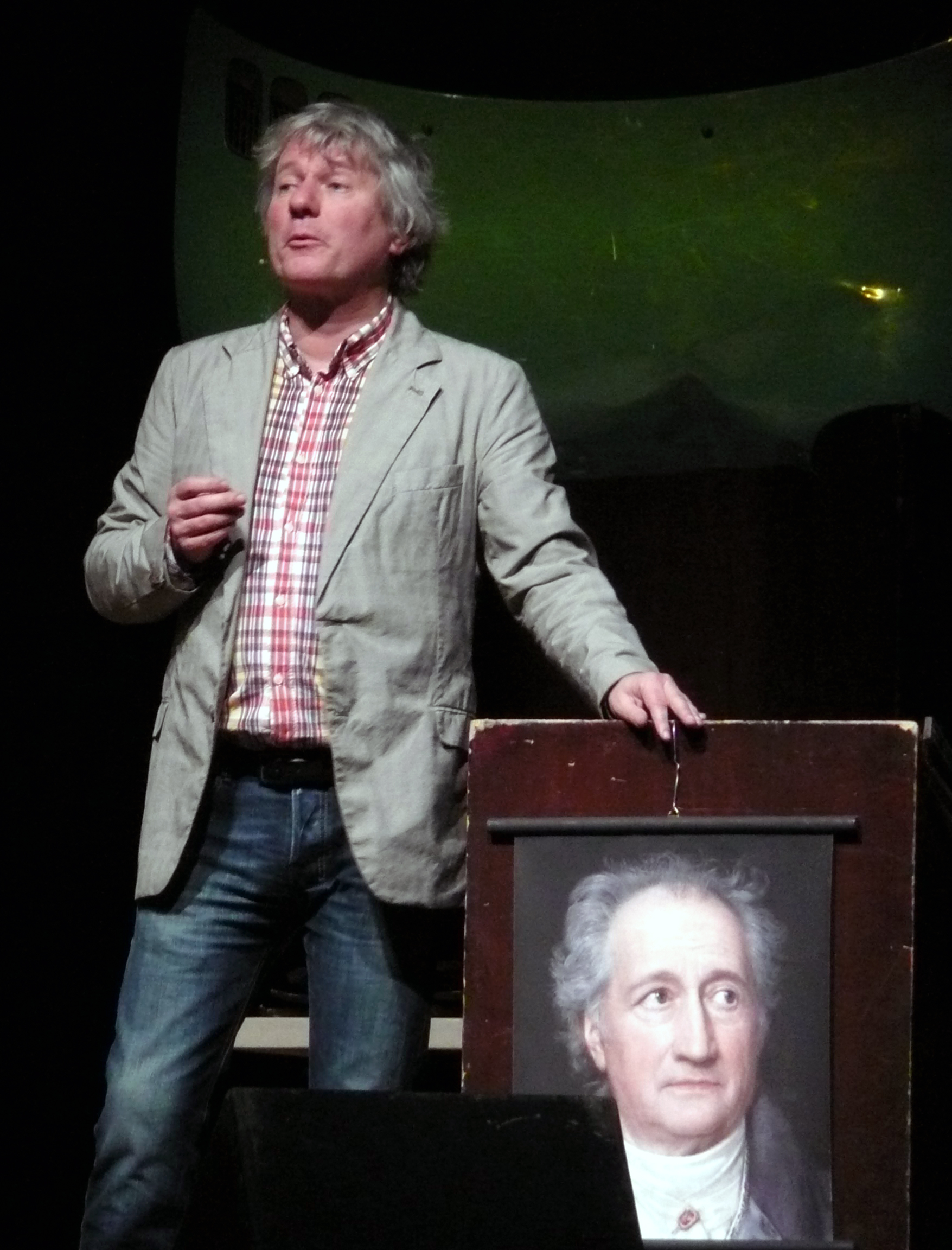 Jürgen Becker während seines Programms "Ja, was glauben Sie denn?" am 12. Dezember 2009 in Düren